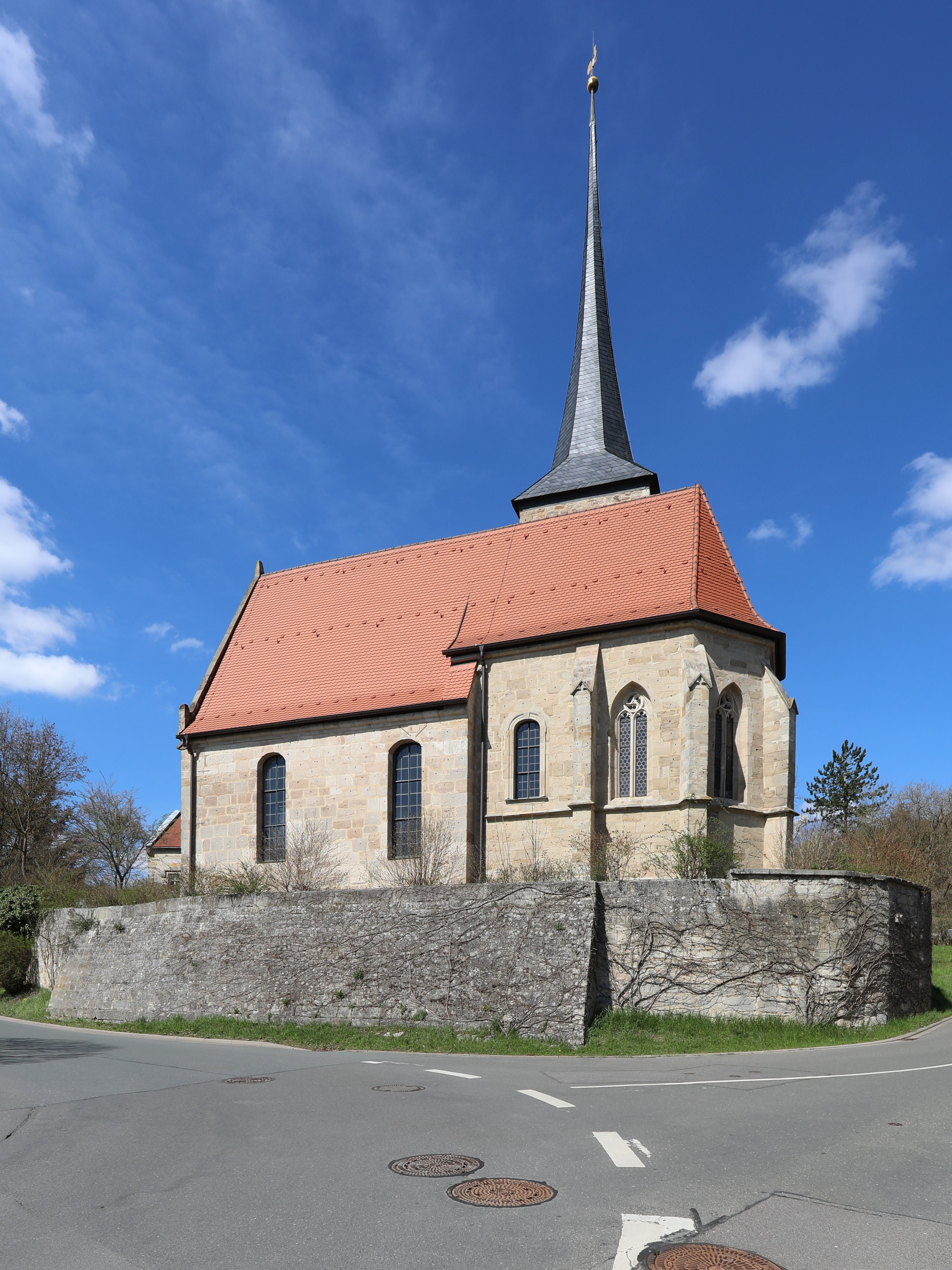 Evangelische Pfarrkirche Unserer Lieben Frau in Seidmannsdorf